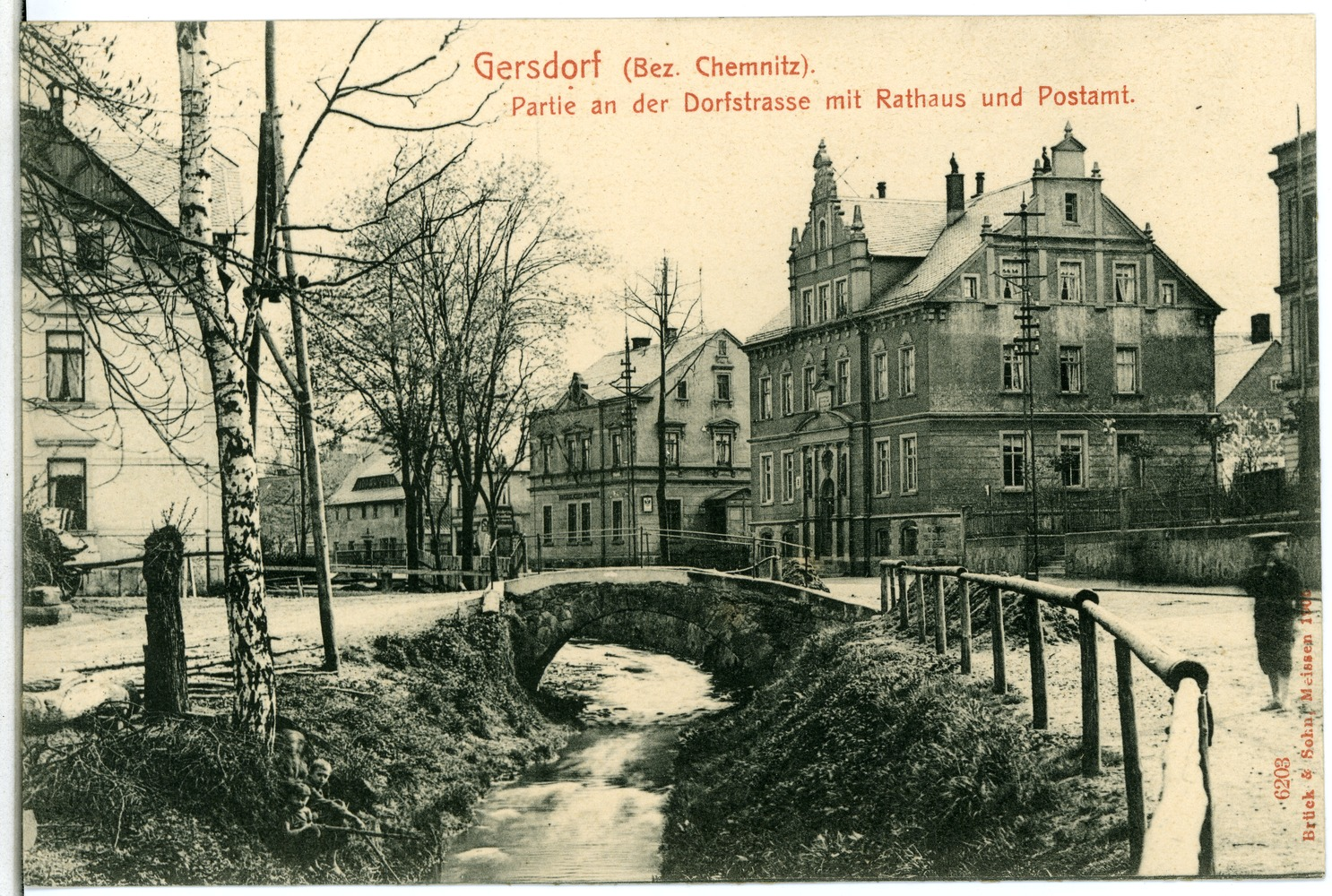 Gersdorf; Dorfstraße mit Rathaus und Postamt Diese Ansichtskarte stammt vom Kunstverlag Brück & Sohn aus Meißen ( Die Karte hat die eindeutige Nummer 06203 und ist in höherer Auflösung beim Verlag erhältlich. Sie wurde im Rahmen einer Kooperation zwischen Wikipedianern und dem Kunstverlag für Wikimedia Commons zur Verfügung gestellt.